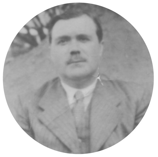 Ramiro Paz Carbajal.